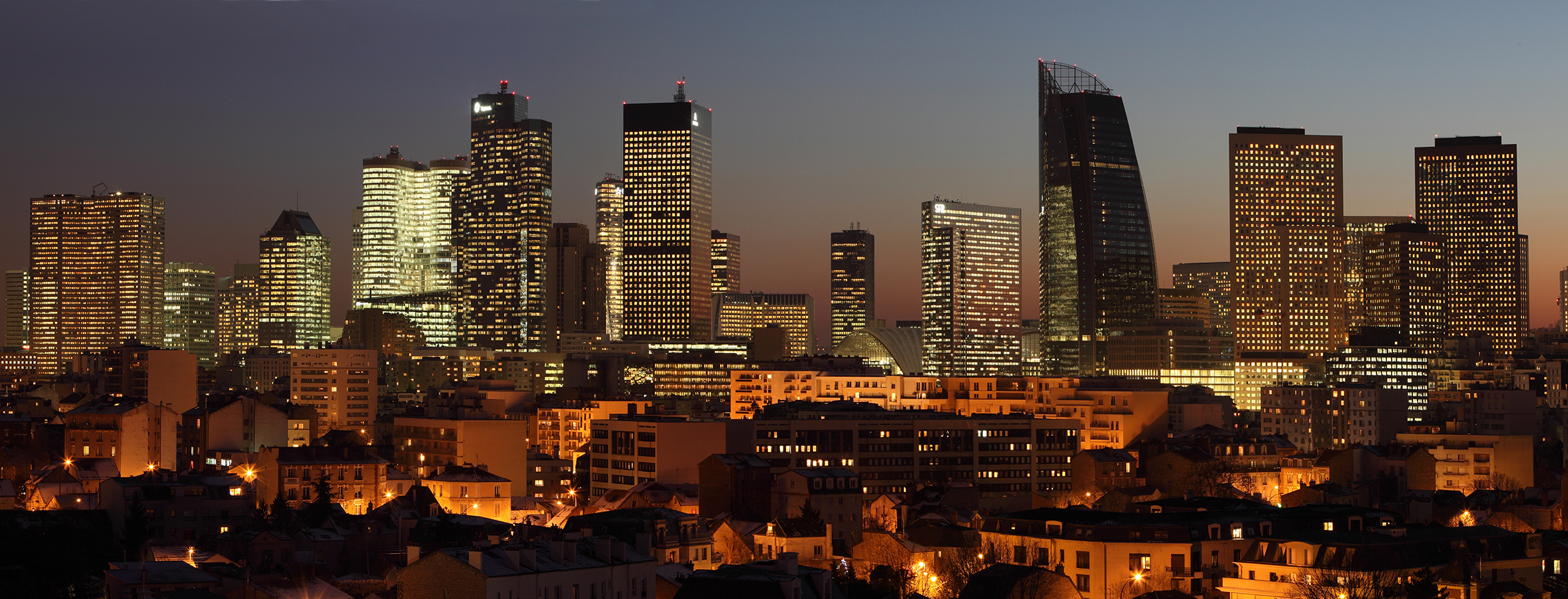 La Défense depuis La Garenne-Colombes La Garenne-Colombes (92250) © Christophe Taamourte / La Garenne-Colombes